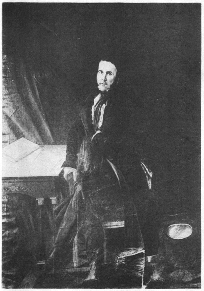 Portrait de Paul Émile Soubiran (1770-1855), père d’Aurélie Ghika (1820-1904). Auteur et date inconnus, reproduction typographique dans l’ouvrage de Louis Puech, P. É. Soubiran, un aventurier gascon, 1907